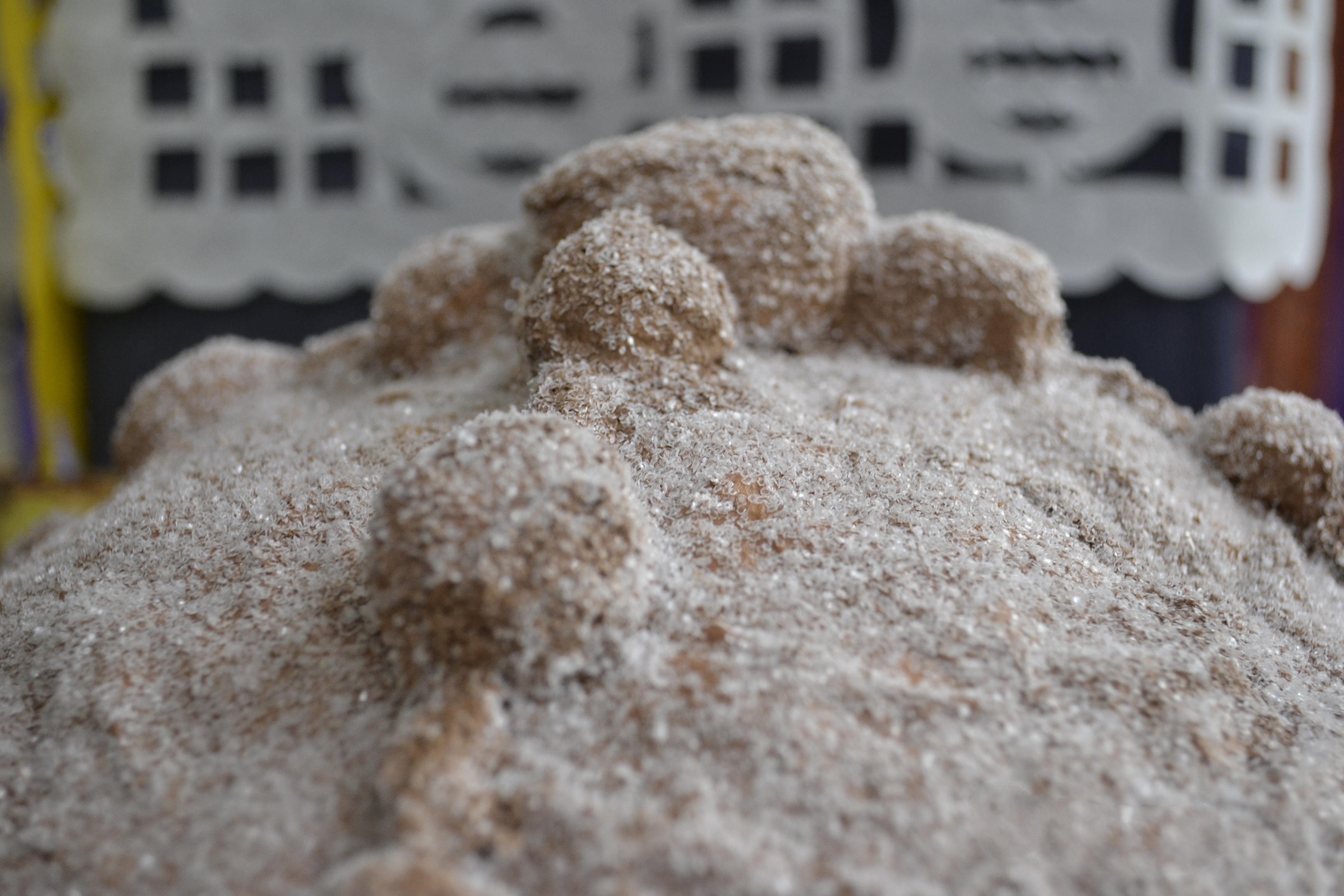 El pan de muerto es típico de México. Los adornos hechos de masa hacen referencia a los huesos de los difuntos.